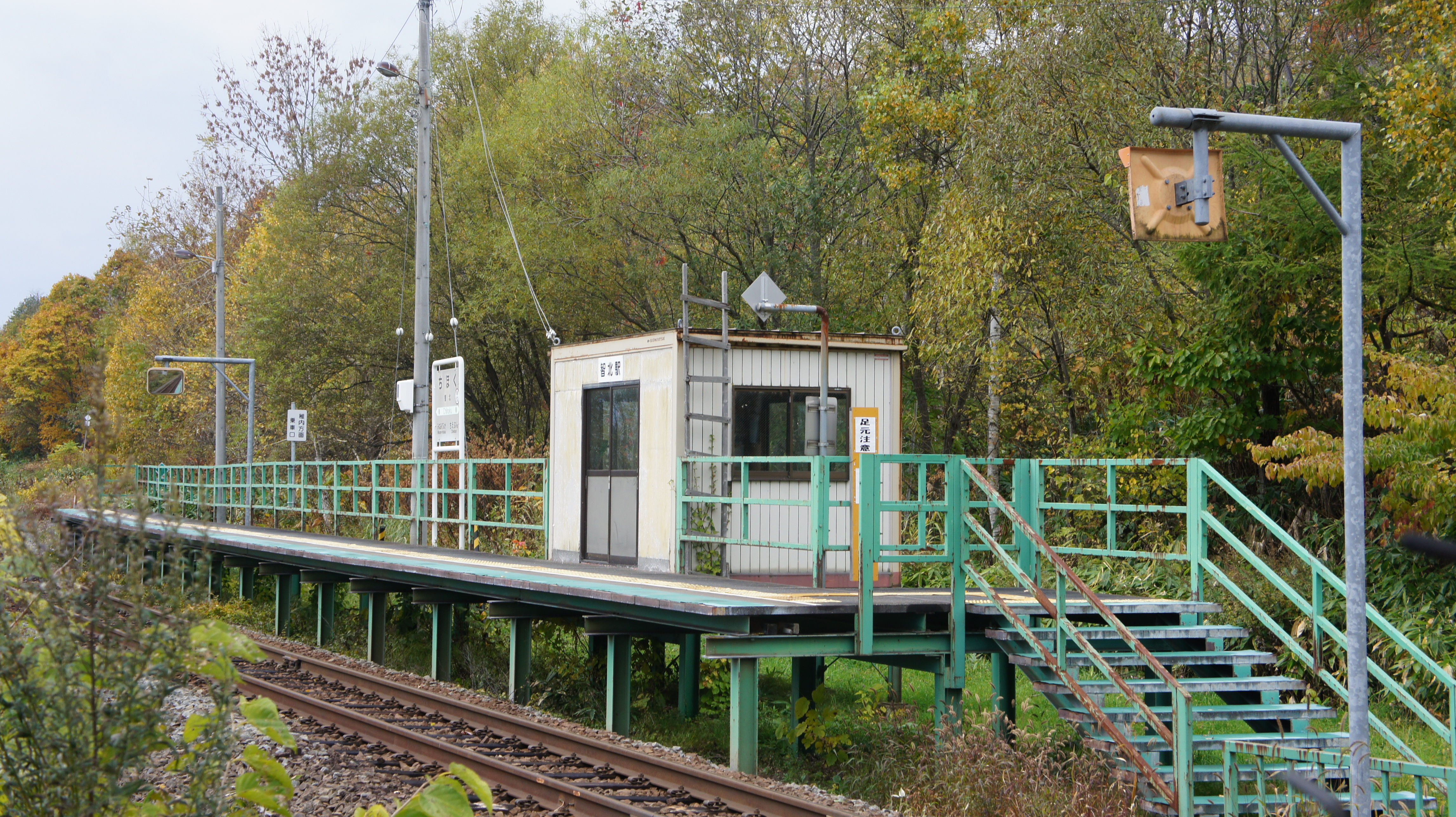 JR宗谷本線・智北駅全景 Sony NEX-3